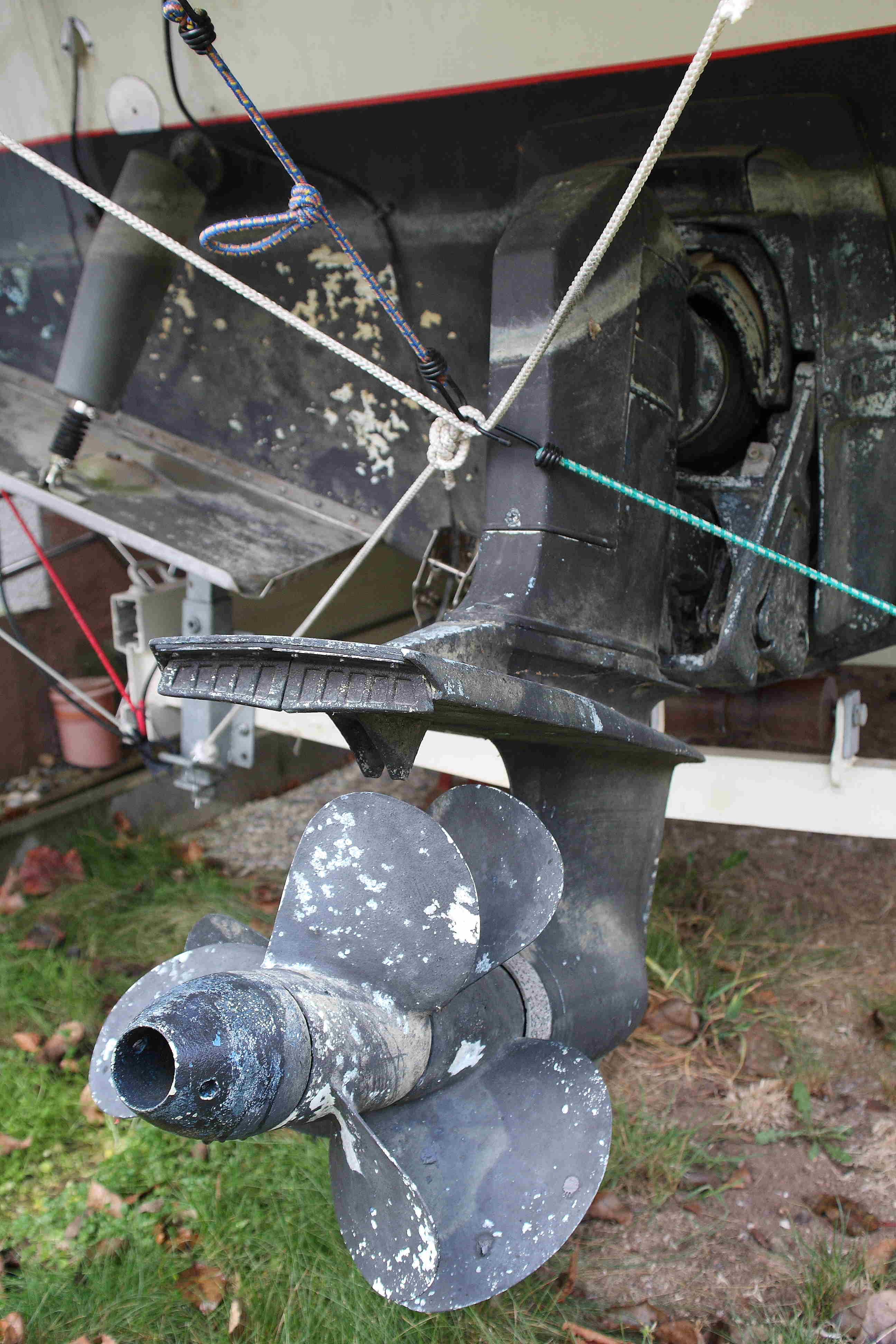 Mit Antifouling überstrichener Duoprop, Wahrscheinlich DP-A